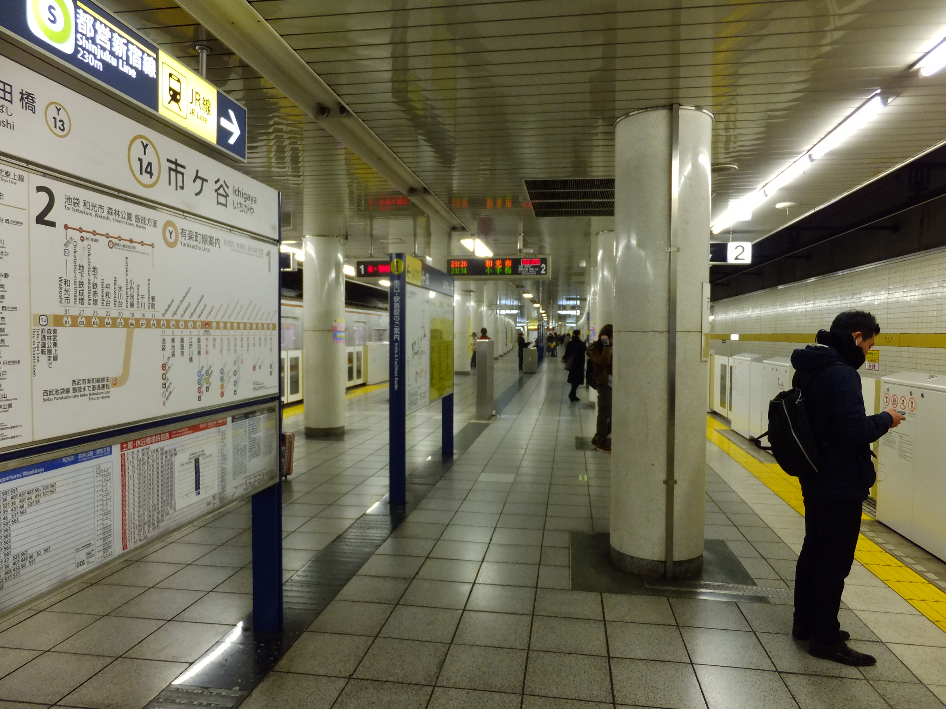 東京メトロ有楽町線・市ヶ谷駅プラットホーム